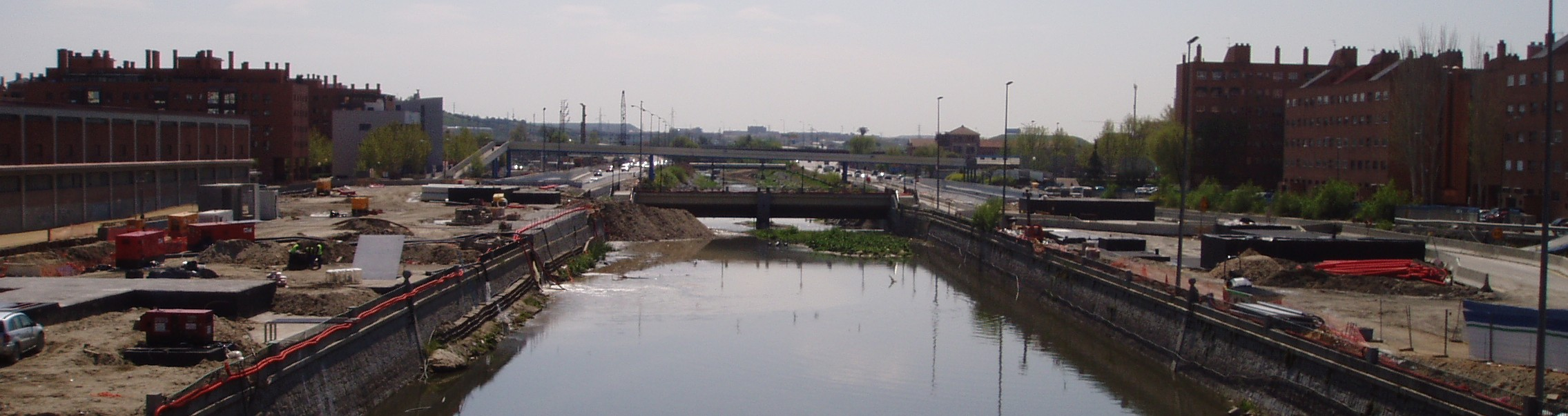 Vista del barrio de Legazpi, el río Manzanares y el barrio de ALmandrales desde el puente de la Princesa. Madrid. España. Abril 2007